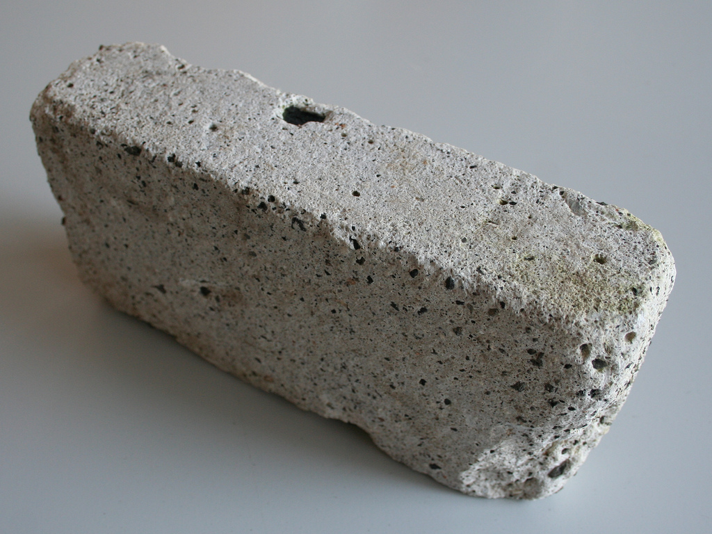 Ein aus Hochbrand-Gips gegossener Mauerstein im Format eines Ziegelsteins, hergestellt um 1870.